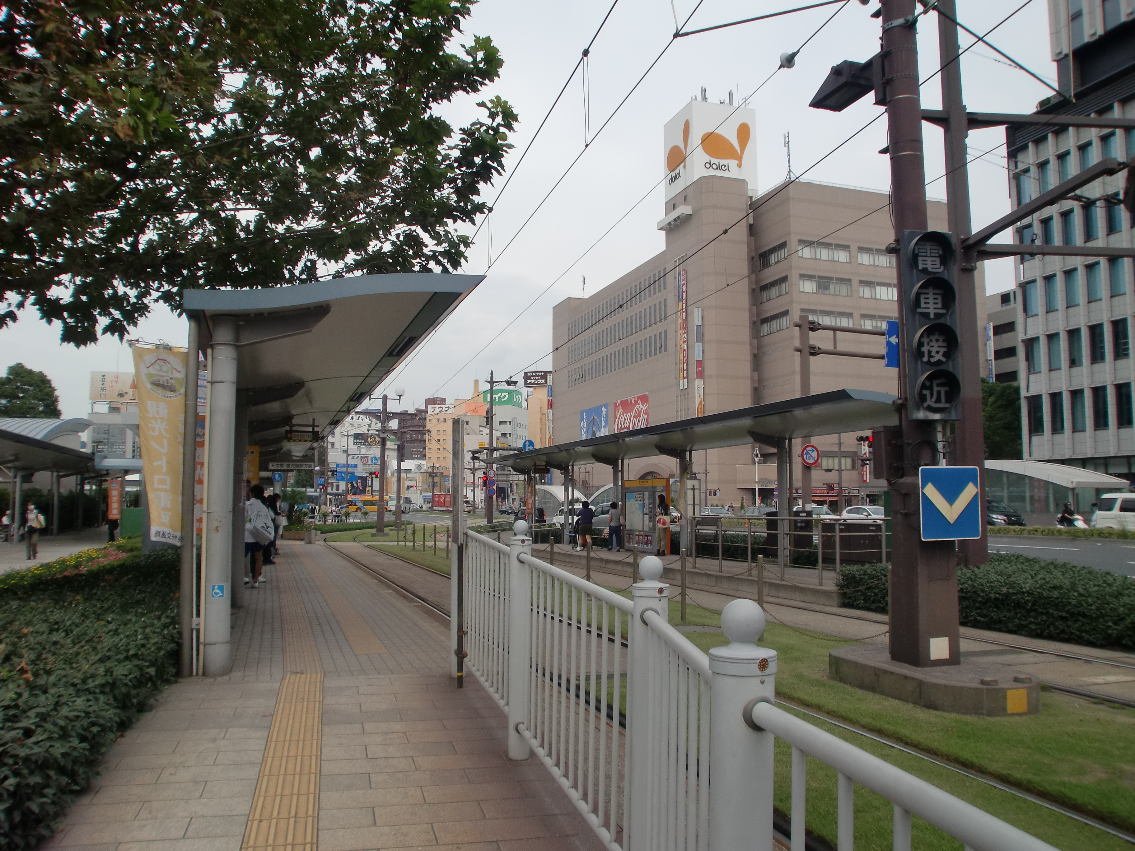 鹿児島中央駅前駅のホーム（左側は天文館方面、右側は谷山・郡元方面）